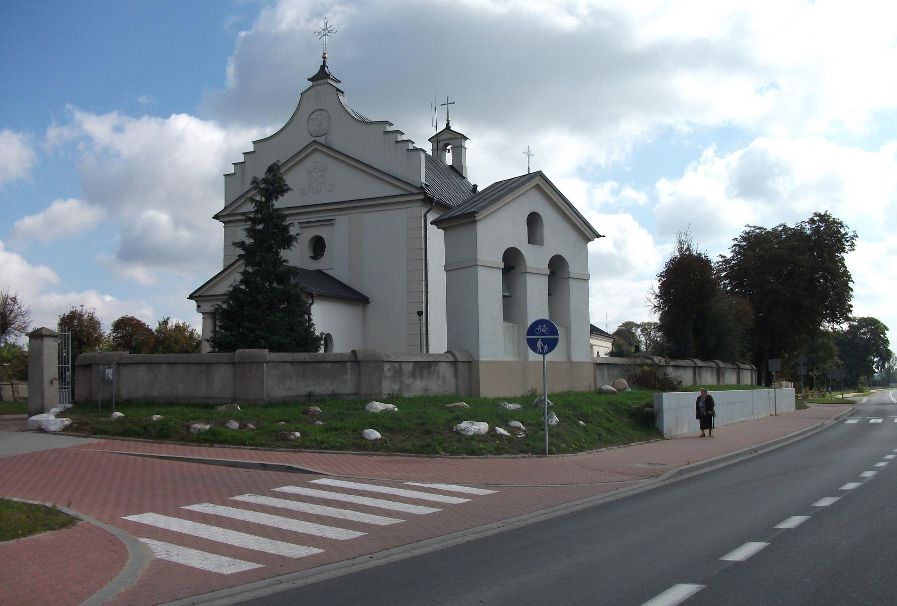 Ruda - kościół parafialny pw. św. Wojciecha BM, mur., pocz. XII w., pocz. XV, XVI w., 1 poł. XIX w. (zabytek nr 154/953 z 30.12.1967)